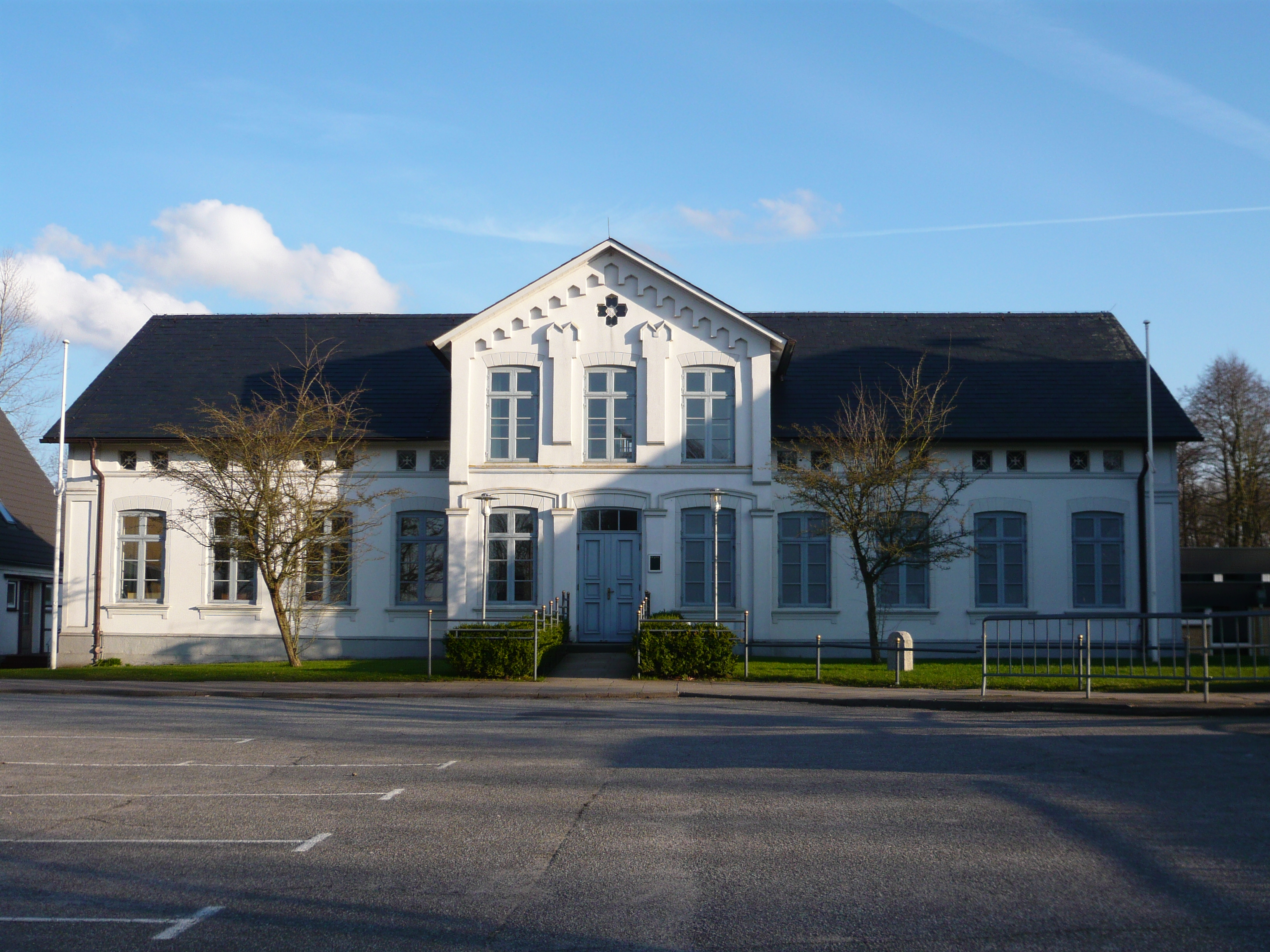 Die Hardesvogtei in Fleckeby diente 1856-1868 als Verwaltungssitz der Hüttener Harde. Seit 2001 Heimat- und Kulturstätte.